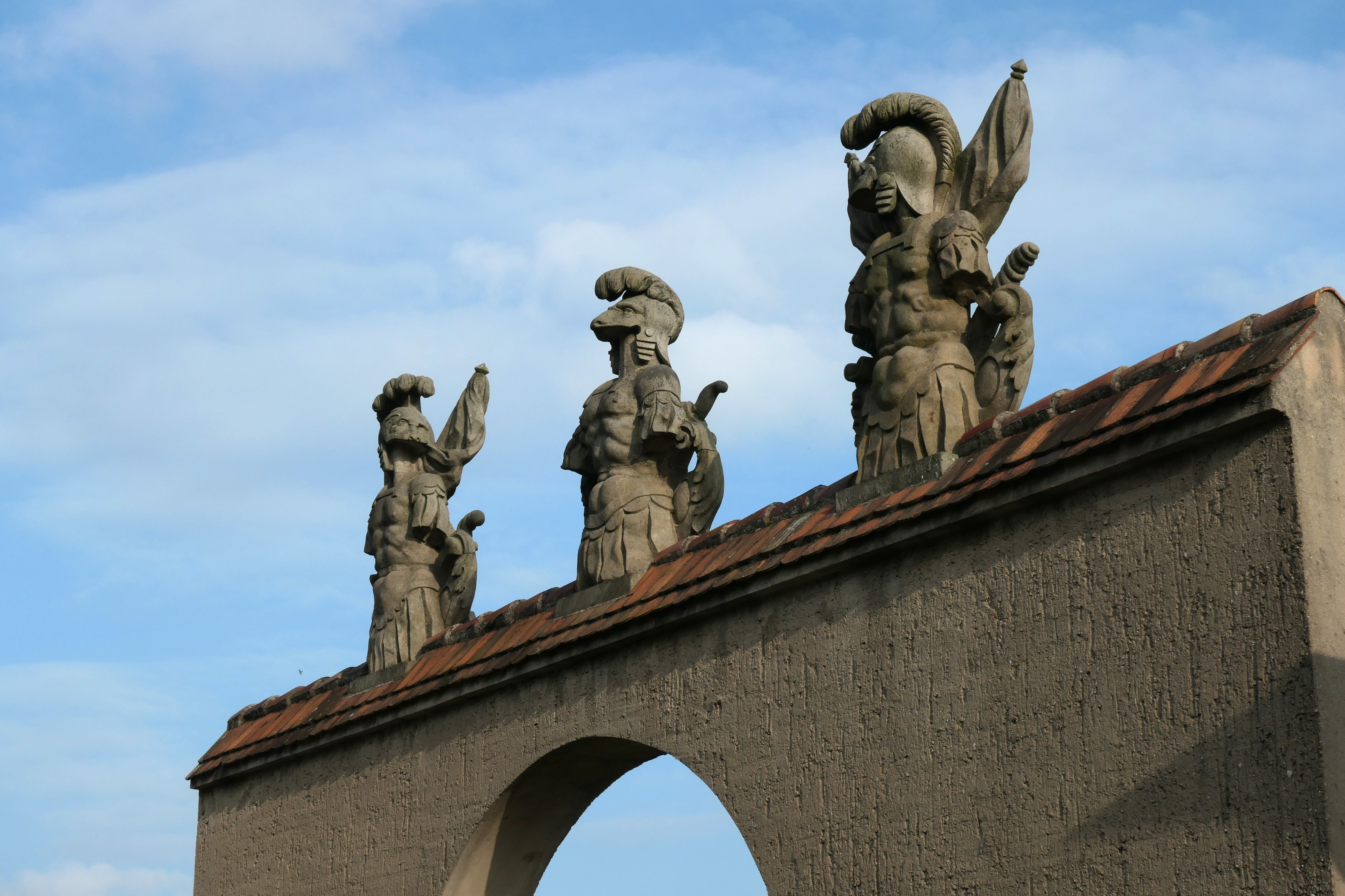 Raubrittertor, ursprünlich in Klinge, Kopie aufgestellt in Groß Schacksdorf. Detail der Figuren.